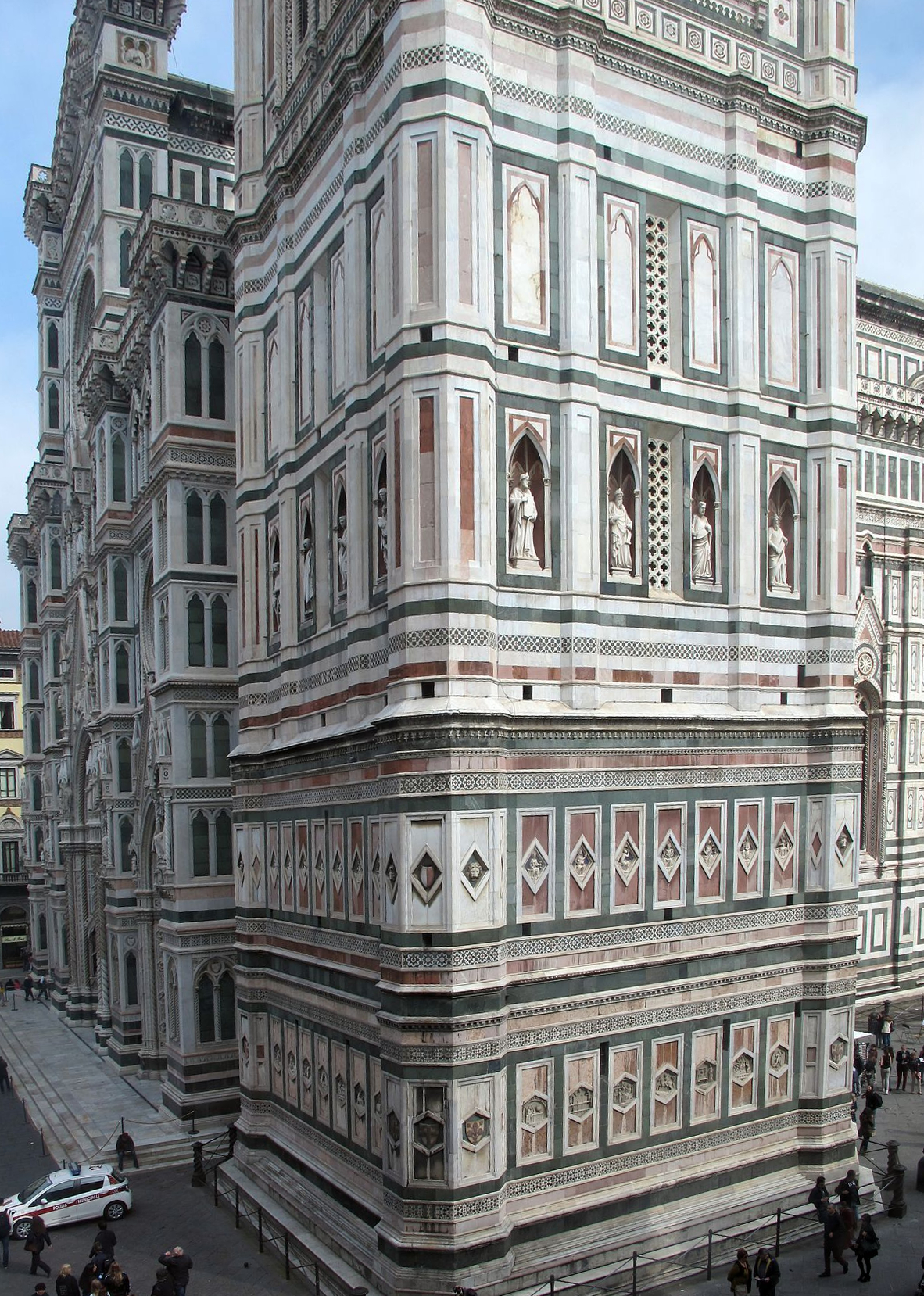 Museo della Misericordia - Firenze